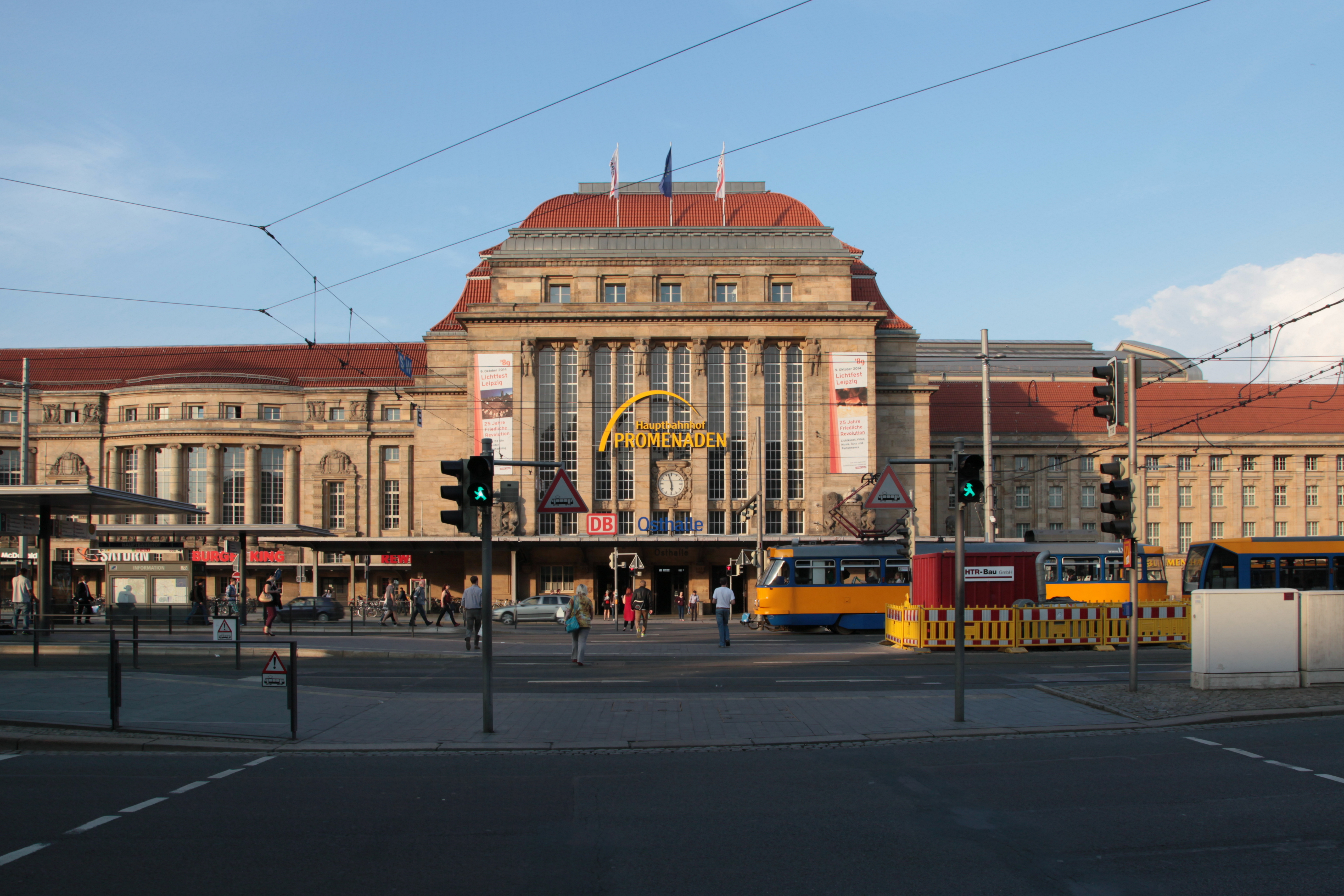 Hauptbahnhof am Willy-Brandt-Platz in Leipzig